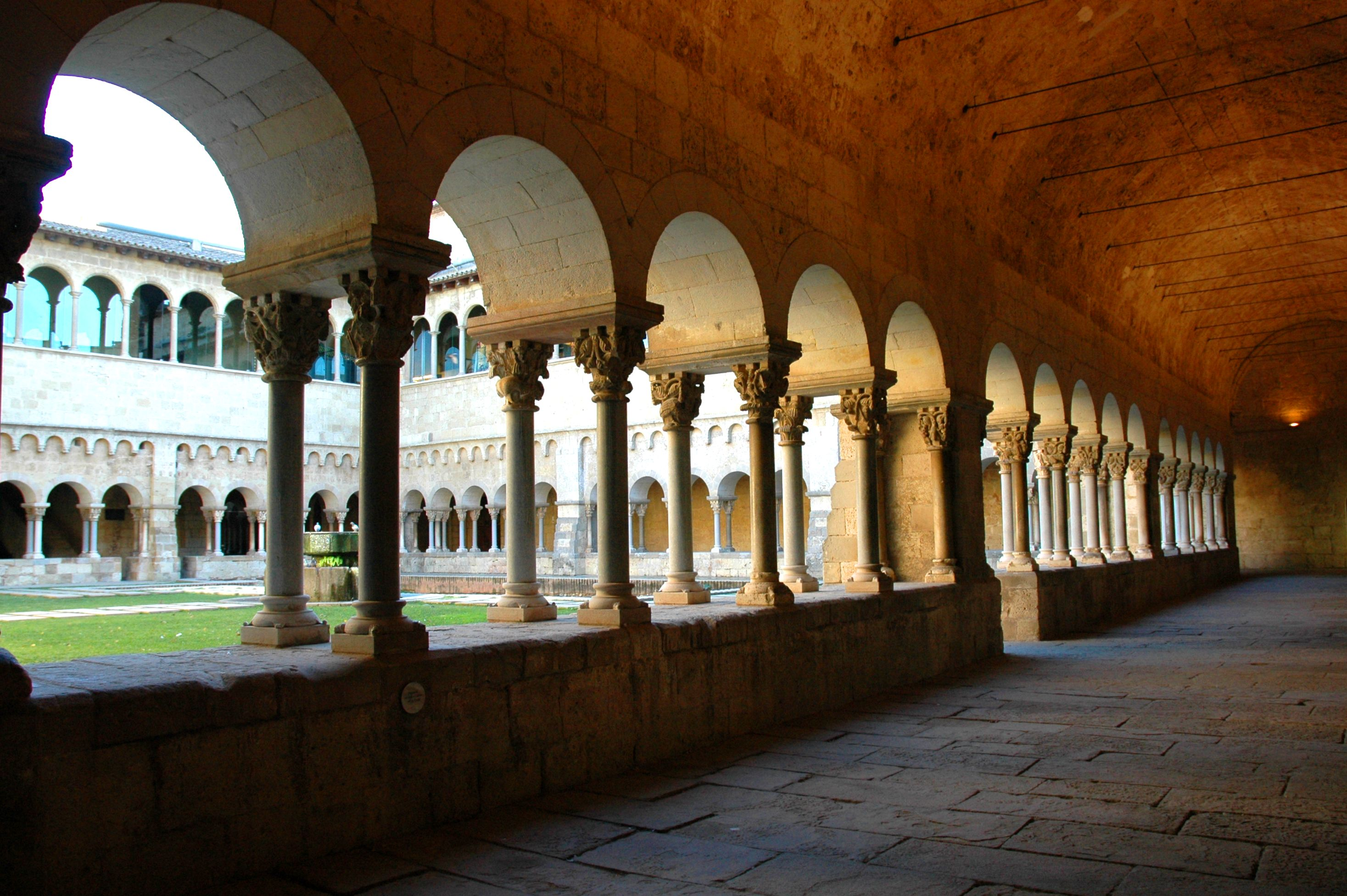 Monestir de Sant Cugat - Claustre galeria de ponent